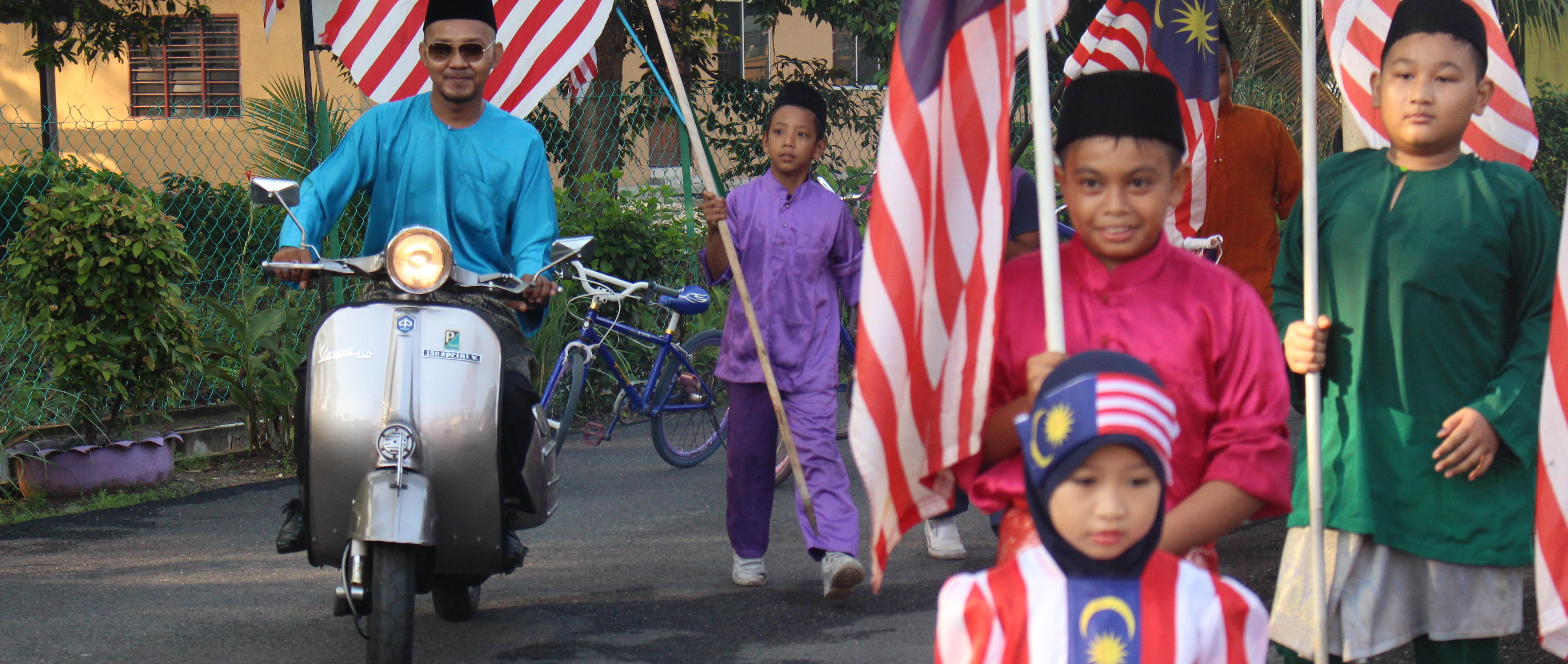 Gimik Pelancaran Sambutan Kemerdekaan 2017